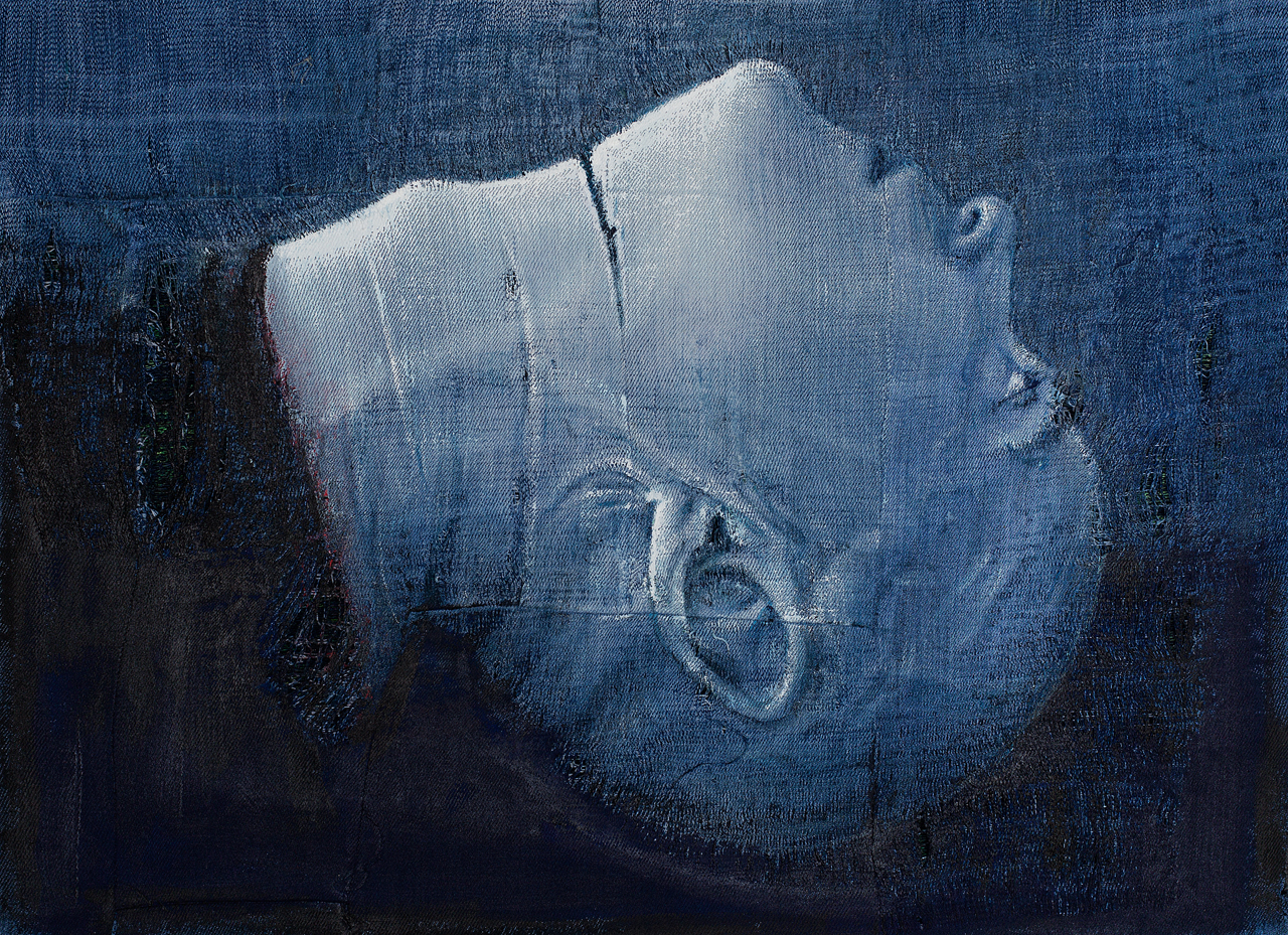 František Matoušek, Francis de Nim, akryl, páraná riflovina, 34 X 48 cm (2016)